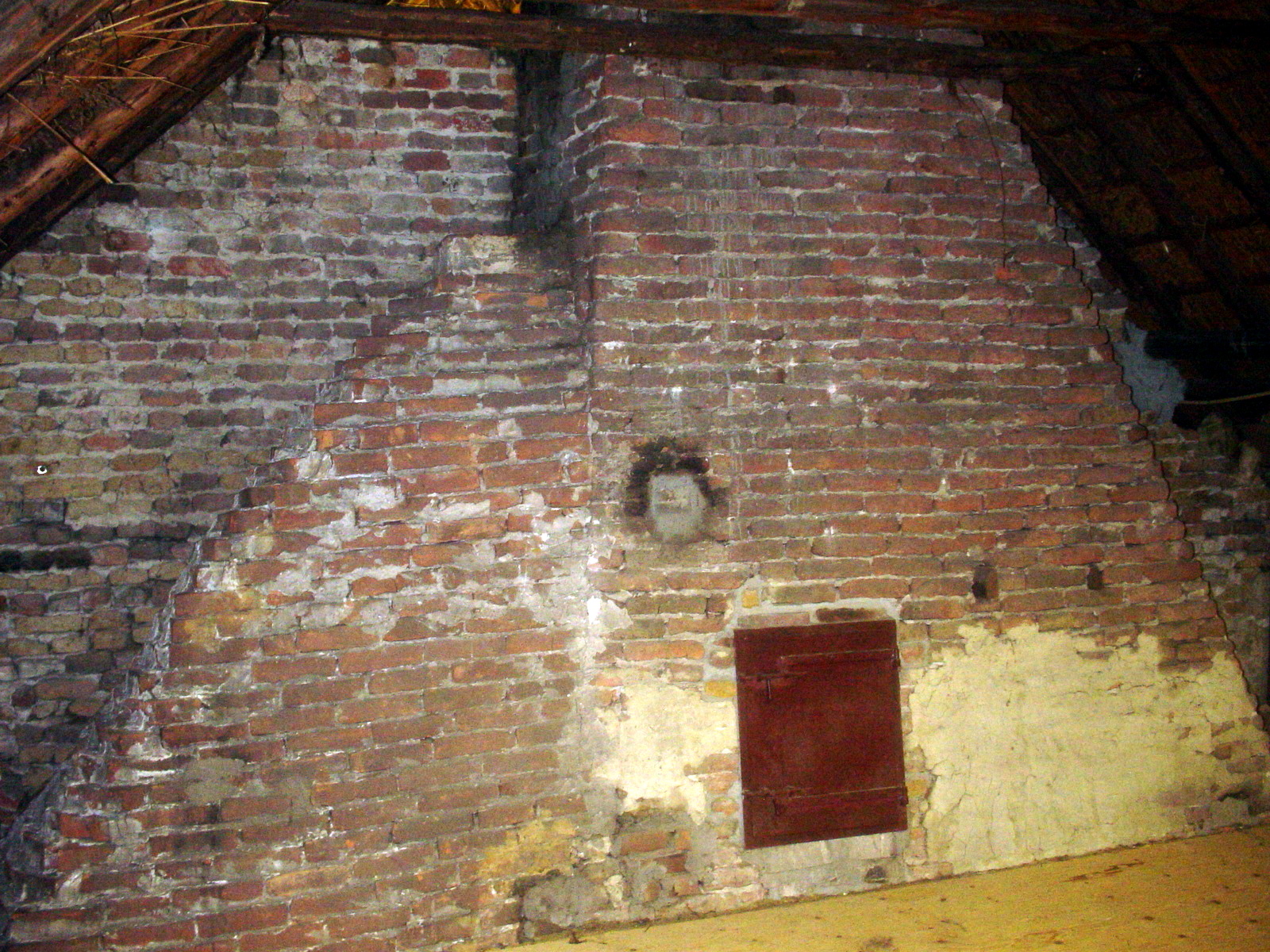 De dubbele schoorsteen in de Plashoeve